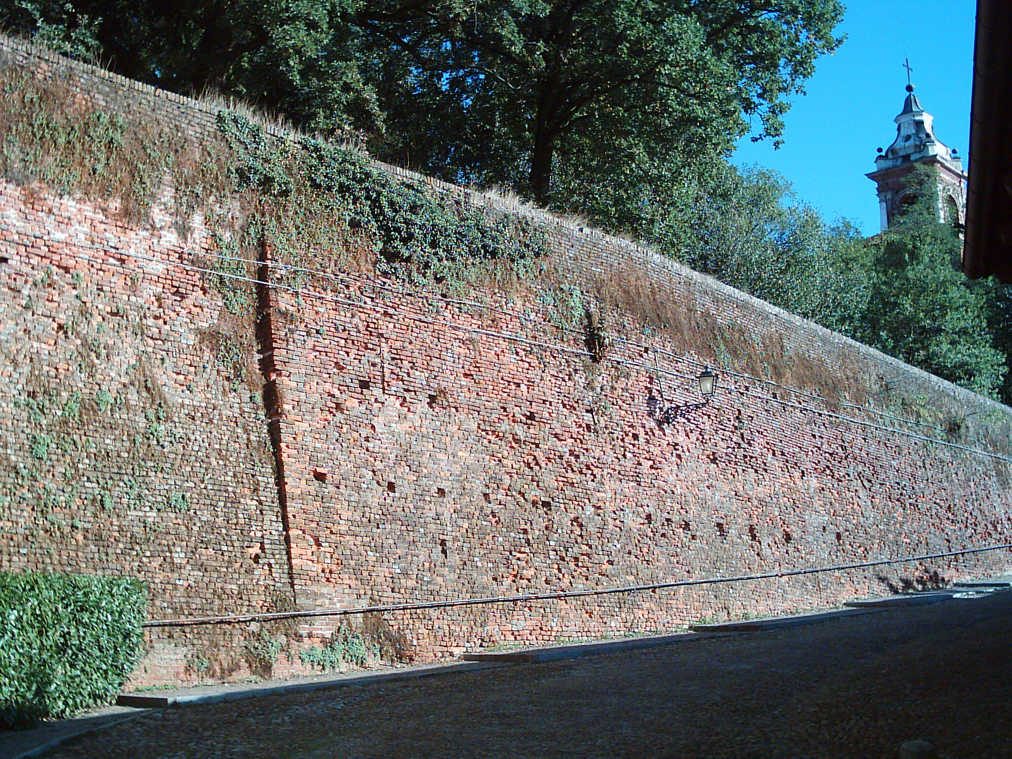 vecchie mura - Sommariva del Bosco - Cuneo - Piemonte - Italia